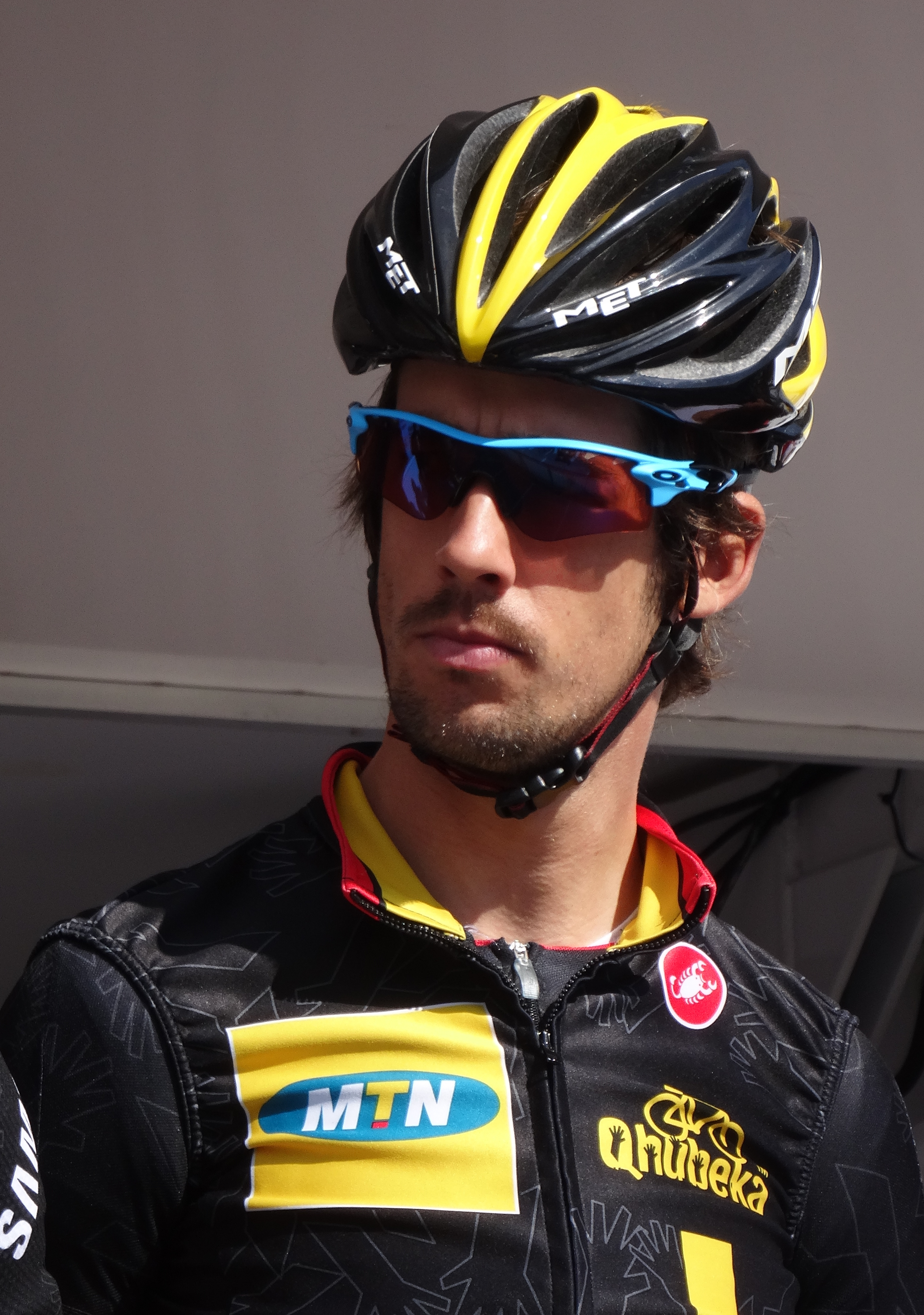 Reportage réalisé le jeudi 17 avril à l'occasion du départ et de l'arrivée du Grand Prix de Denain 2014 à Denain, Nord, Nord-Pas-de-Calais, France.